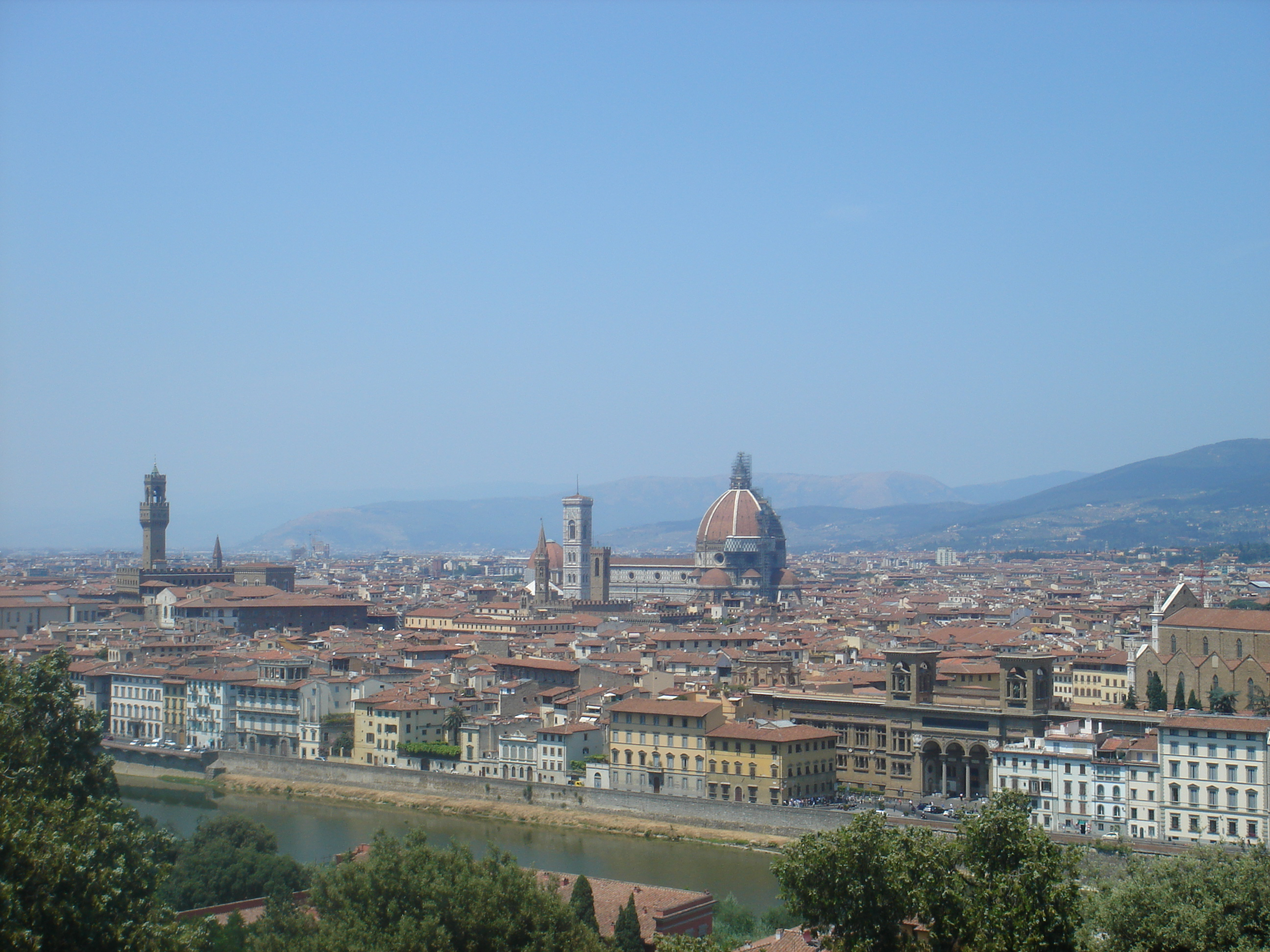 Firenze, panorama da piazzale Michelangelo